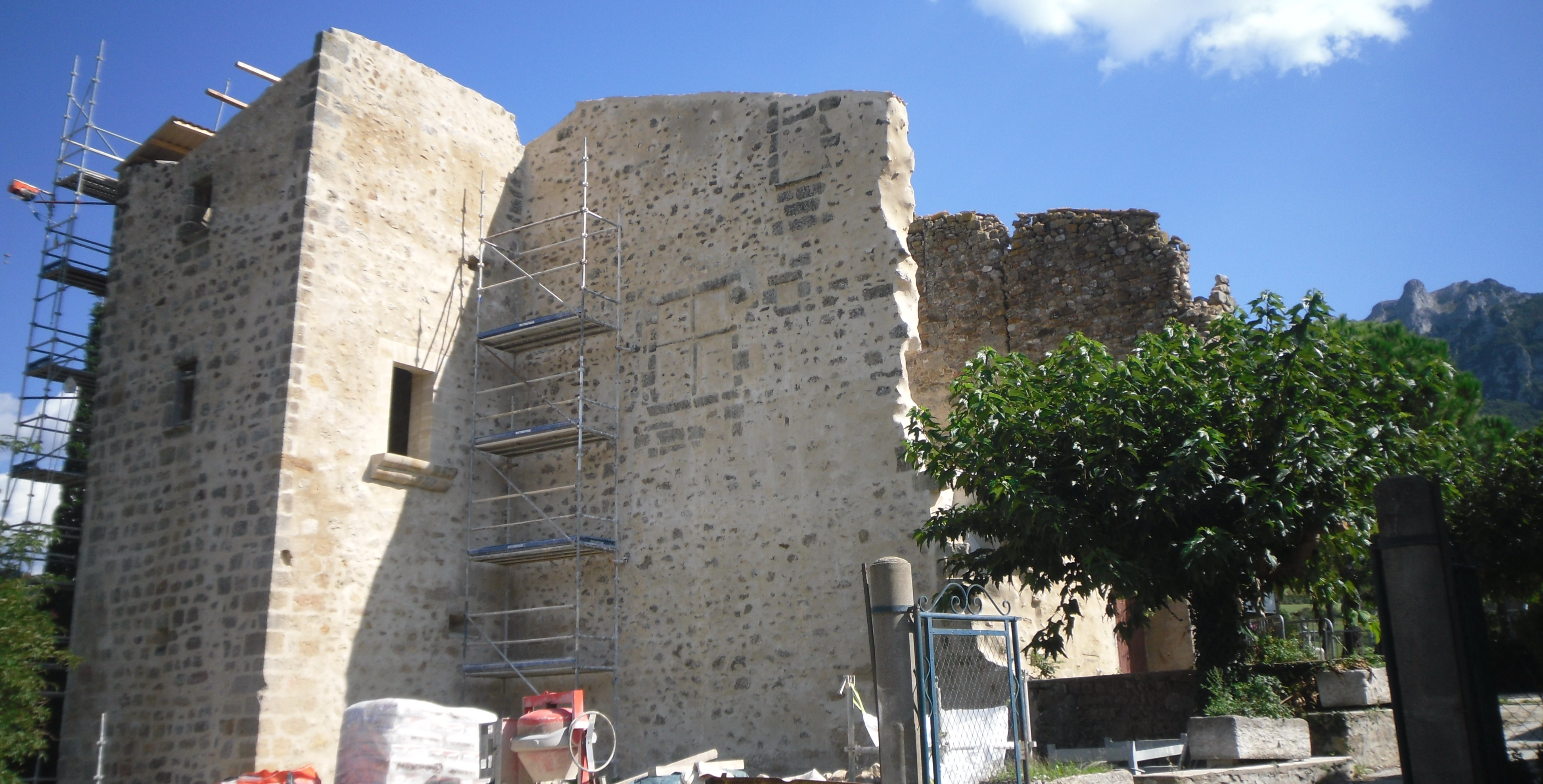 Chateau de Bugarach